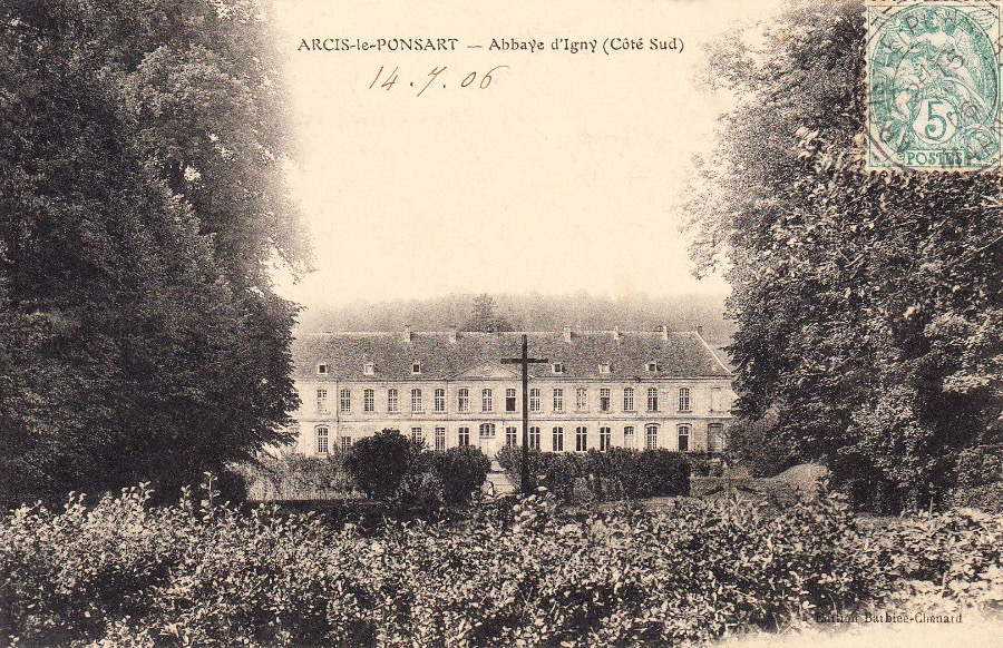 Abbaye d'Igny (côté sud) avant 1914, à Arcis-le-Ponsart (département de la Marne).